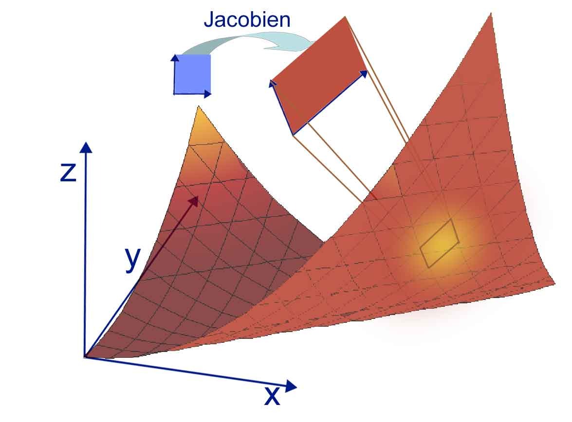 Il·lustra la aplicació lineal corresponent al jacobià d'una funció